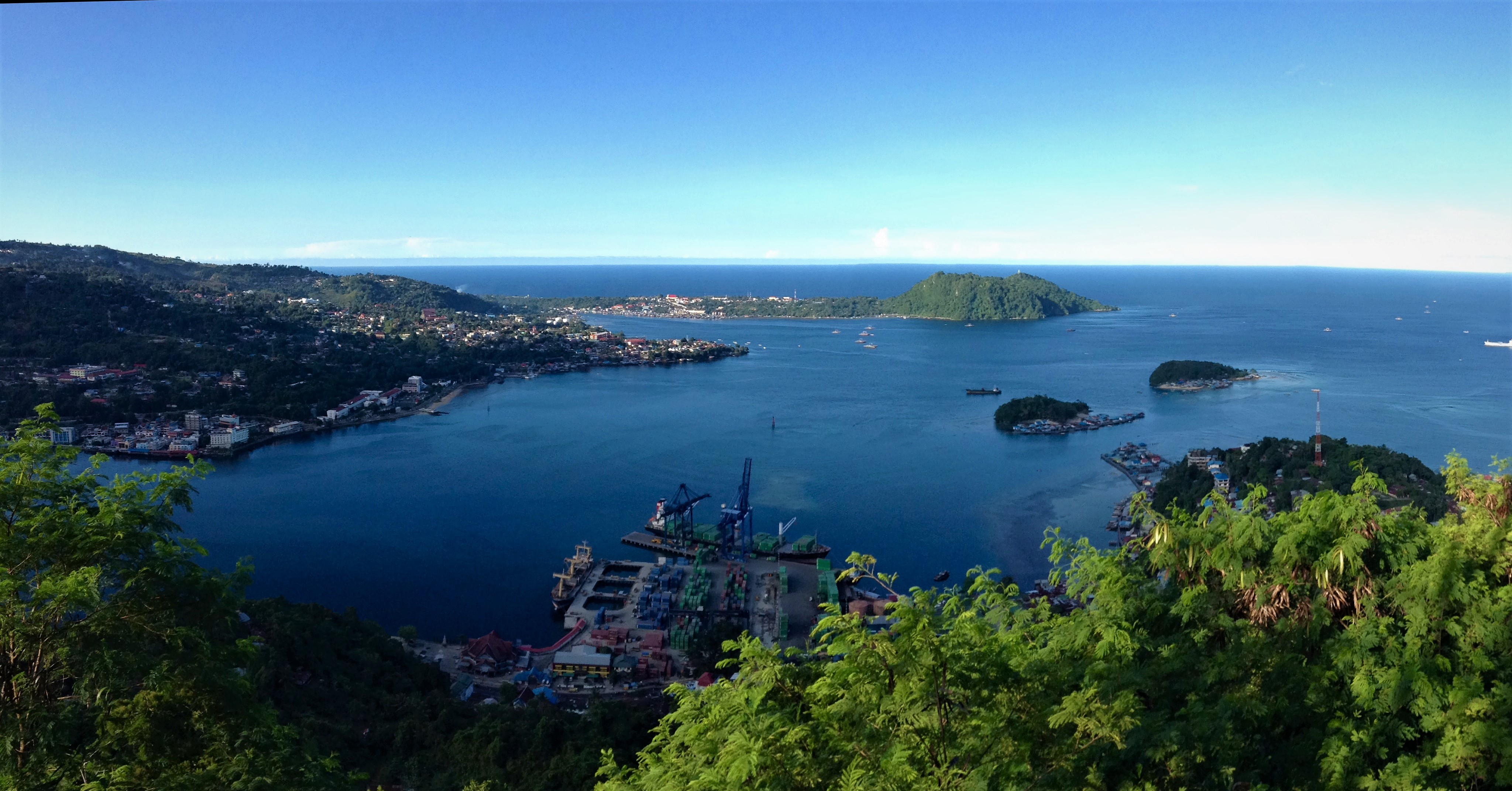 Kota Jayapura dilihat dari atas bukit. Jayapura yang juga adalah ibukota dari Provinsi Papua memiliki pemandangan laut yang memikat, letaknya yang berada di daerah teluk menjadikan lautnya cukup tenang. Sebagai salah satu kota besar di Papua, Jayapura berkembang pesat. Terbukti dengan pesatnya kegiatan pembangunan, juga warga dari berbagai wilayah Indonesia lainnya yang menjadikan kota ini sebagai tempat tinggal dan berkegiatan.